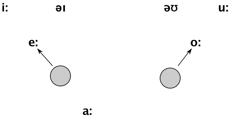 元音大推移-推变链-第二阶段示意图